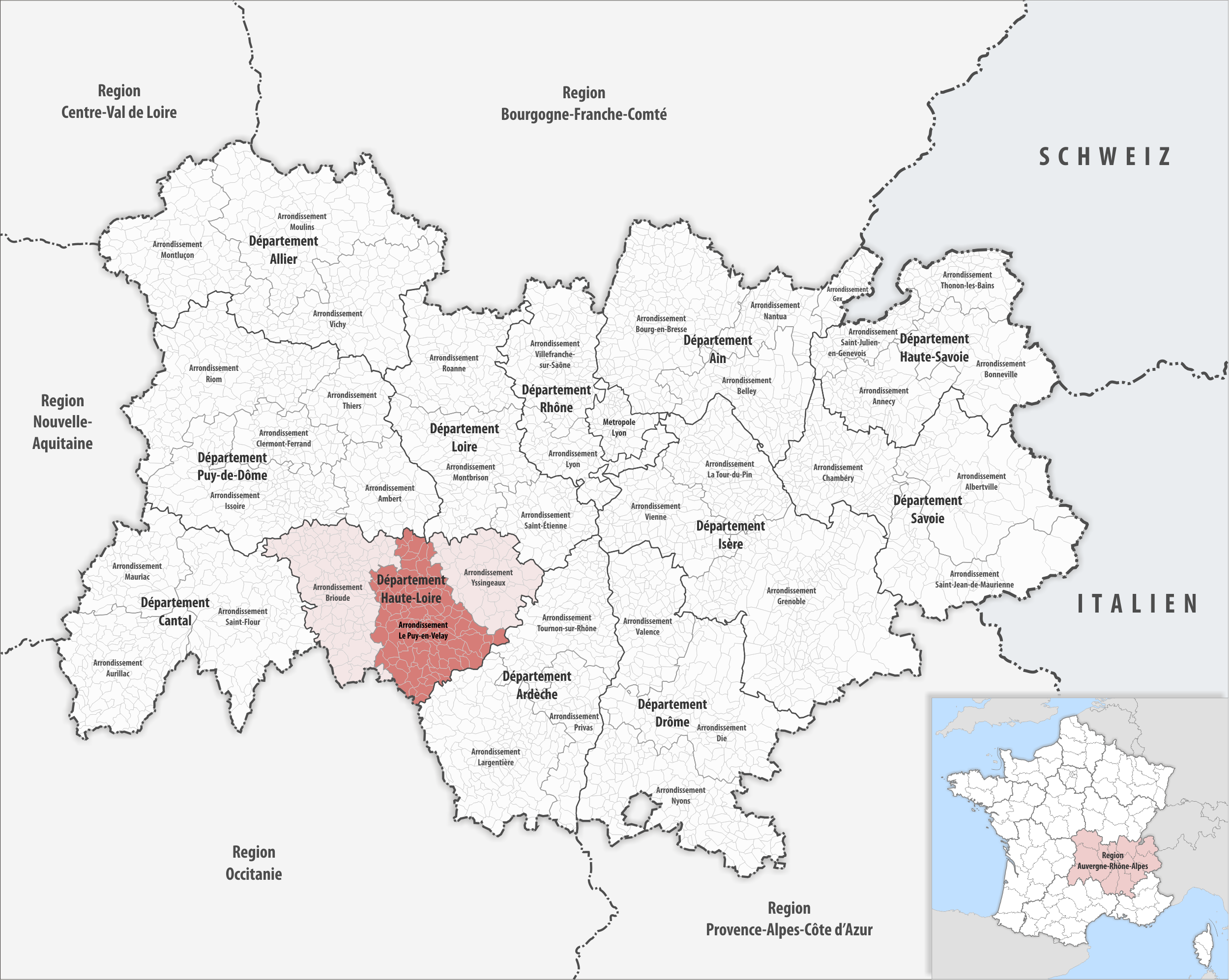 Lage des Arrondissements Le Puy-en-Velay